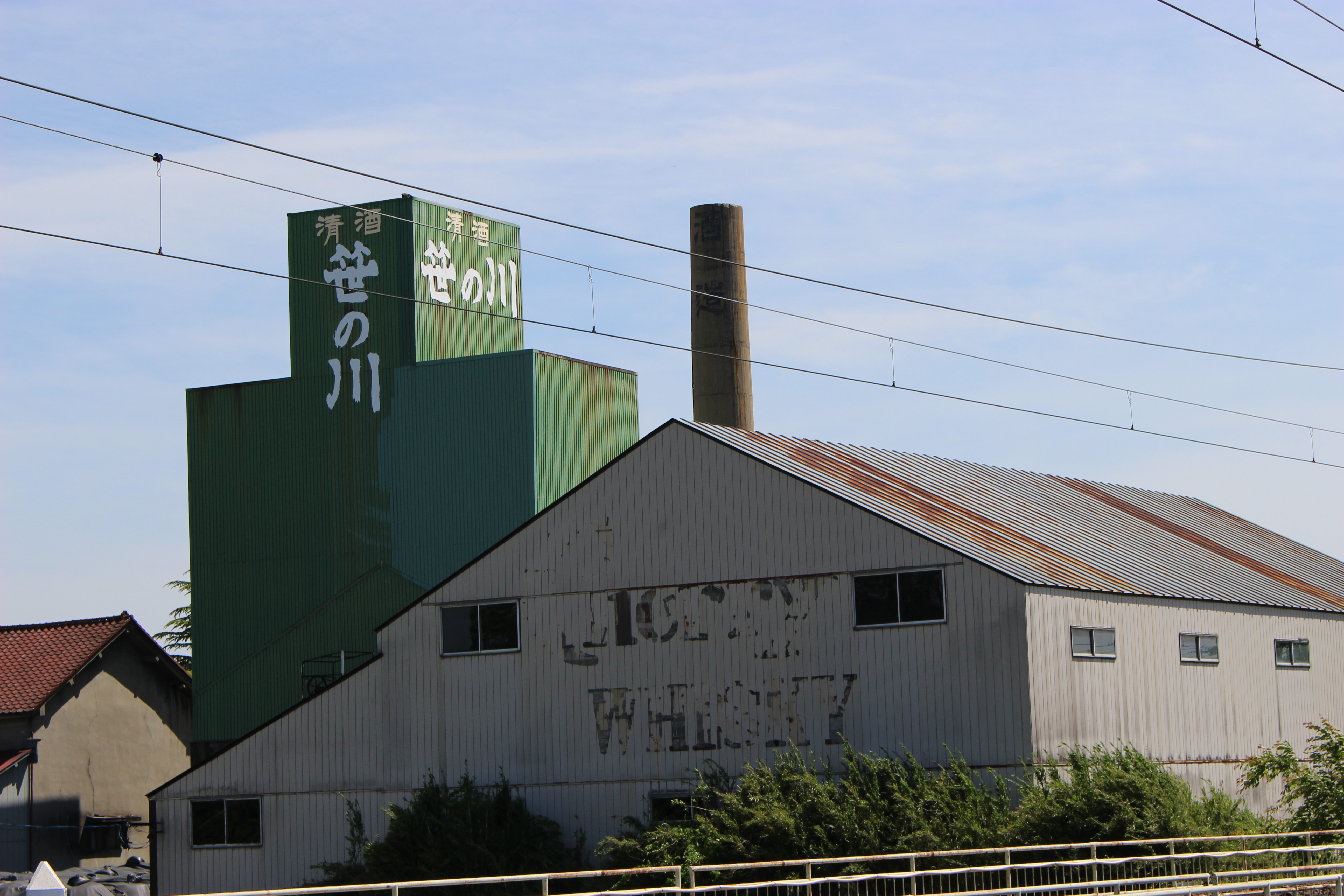 笹の川酒造株式会社本社